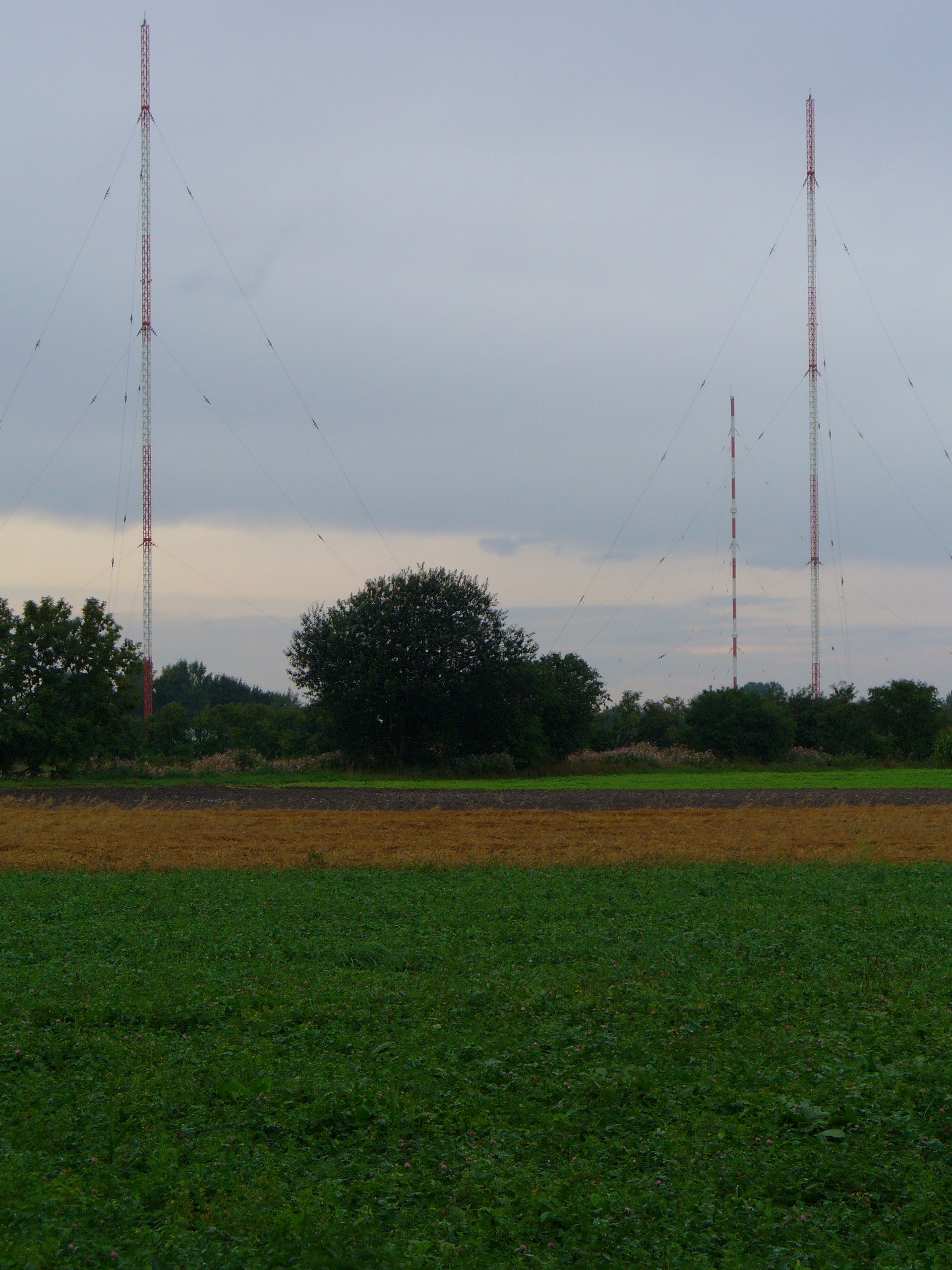 Einige Antennen des Senders Ismaning